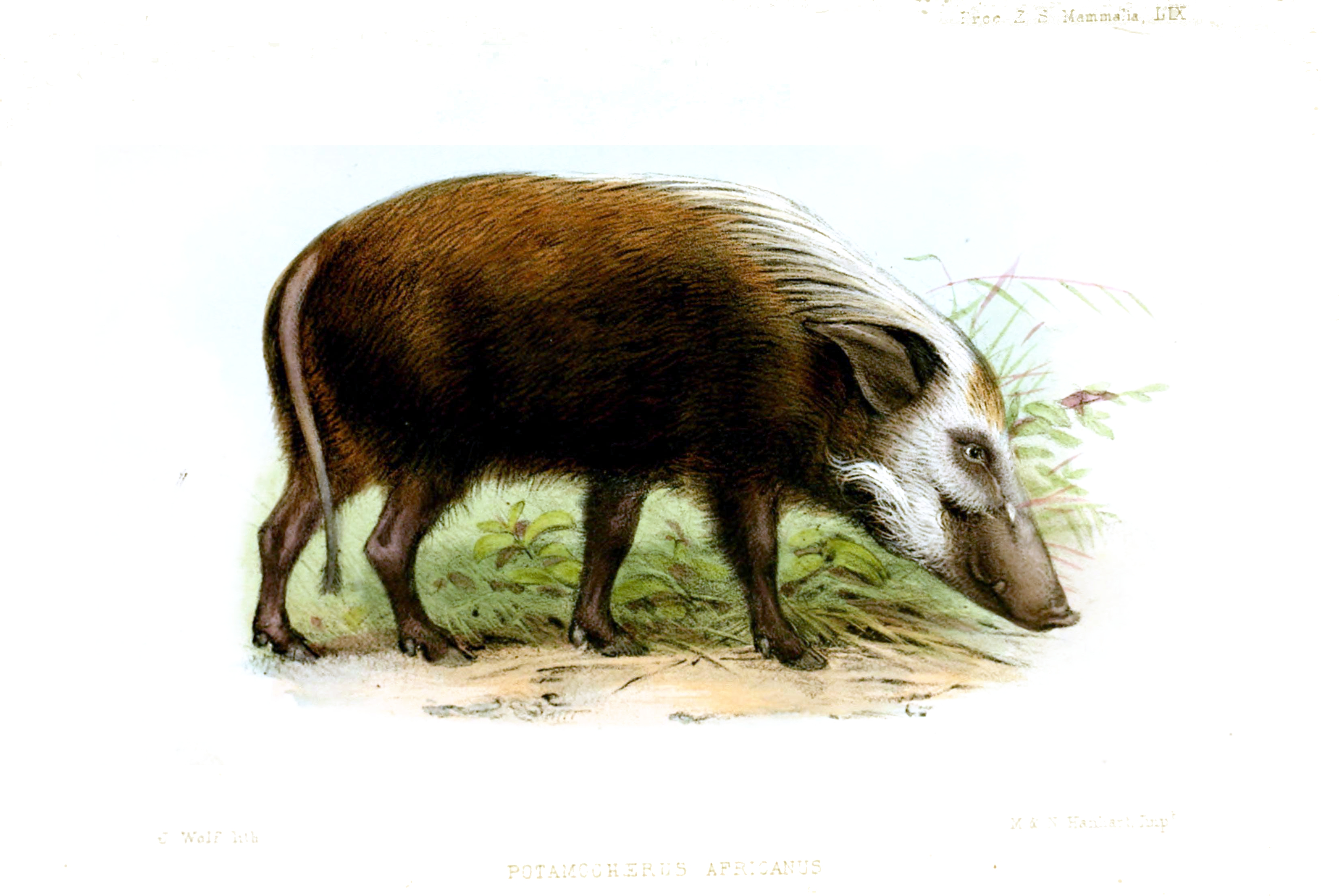 Potamochoerus larvatus africanus